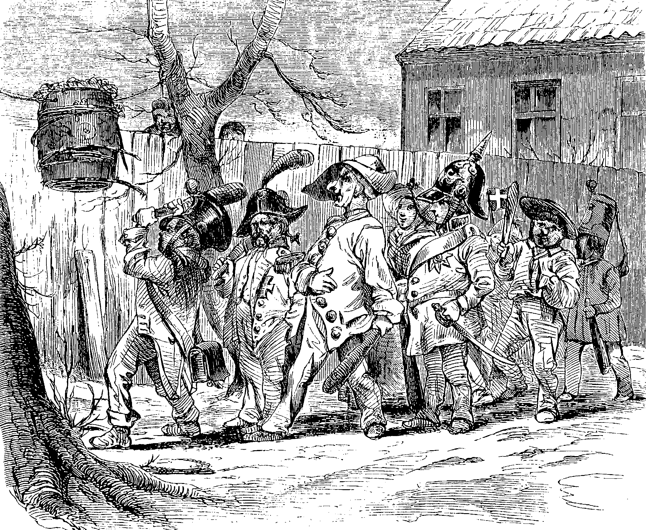 at slå katten af tønden - Fastelavn i Danmark